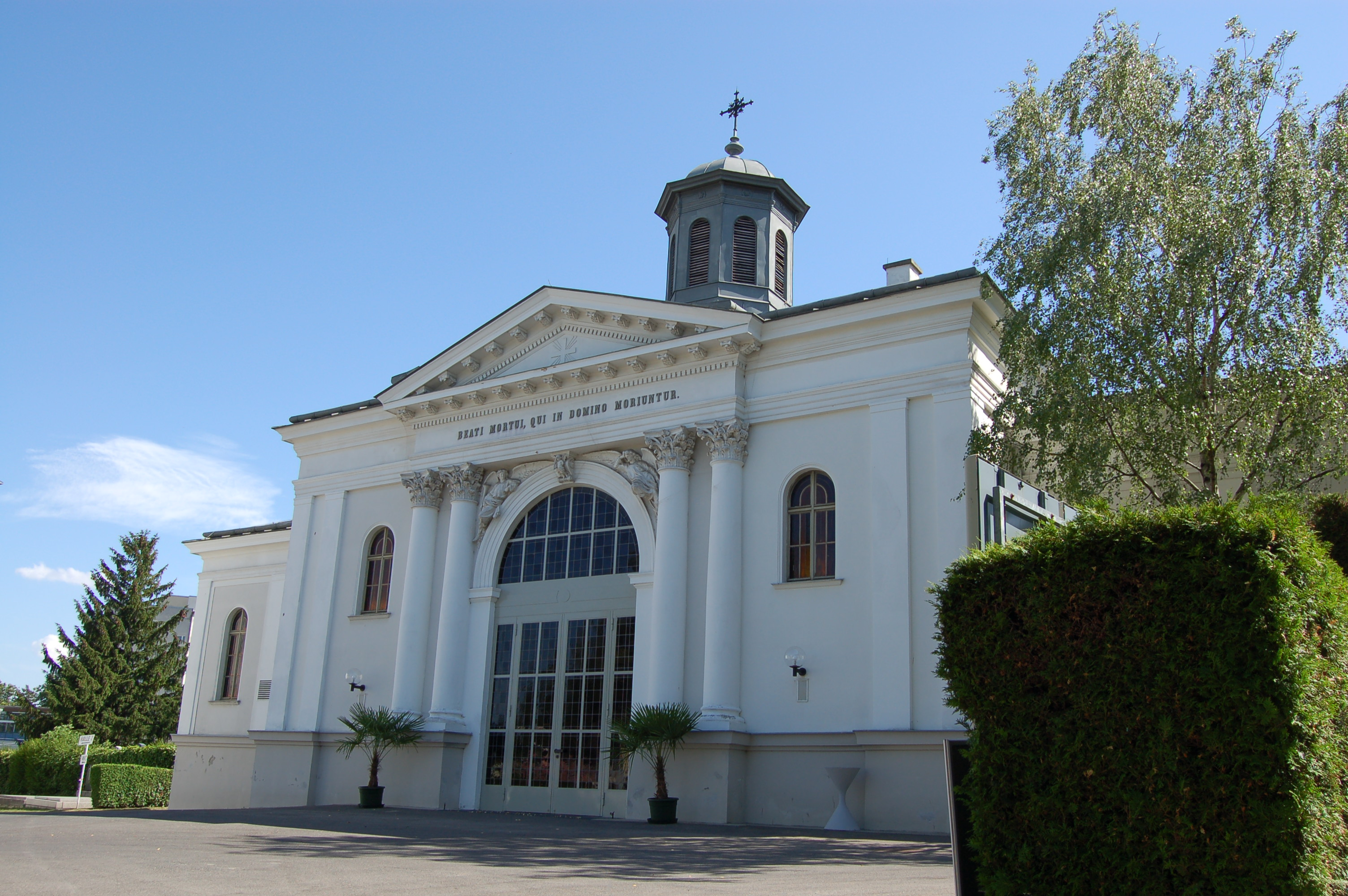 Ottakringer Friedhof , Grabmal von Grosse Aufbahrungshalle